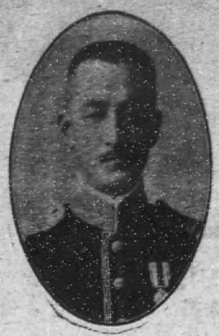 牧野一成子爵（1880～1958）